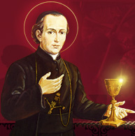 Imagen de San Gaspar del Búfalo